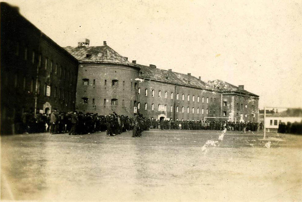 L'appel des prisonniers du stalag 325 à la citadelle de Lemberg ( LWOW)